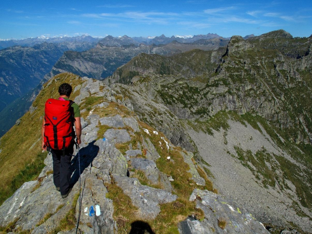 Via Alta Idra TI, Schweiz